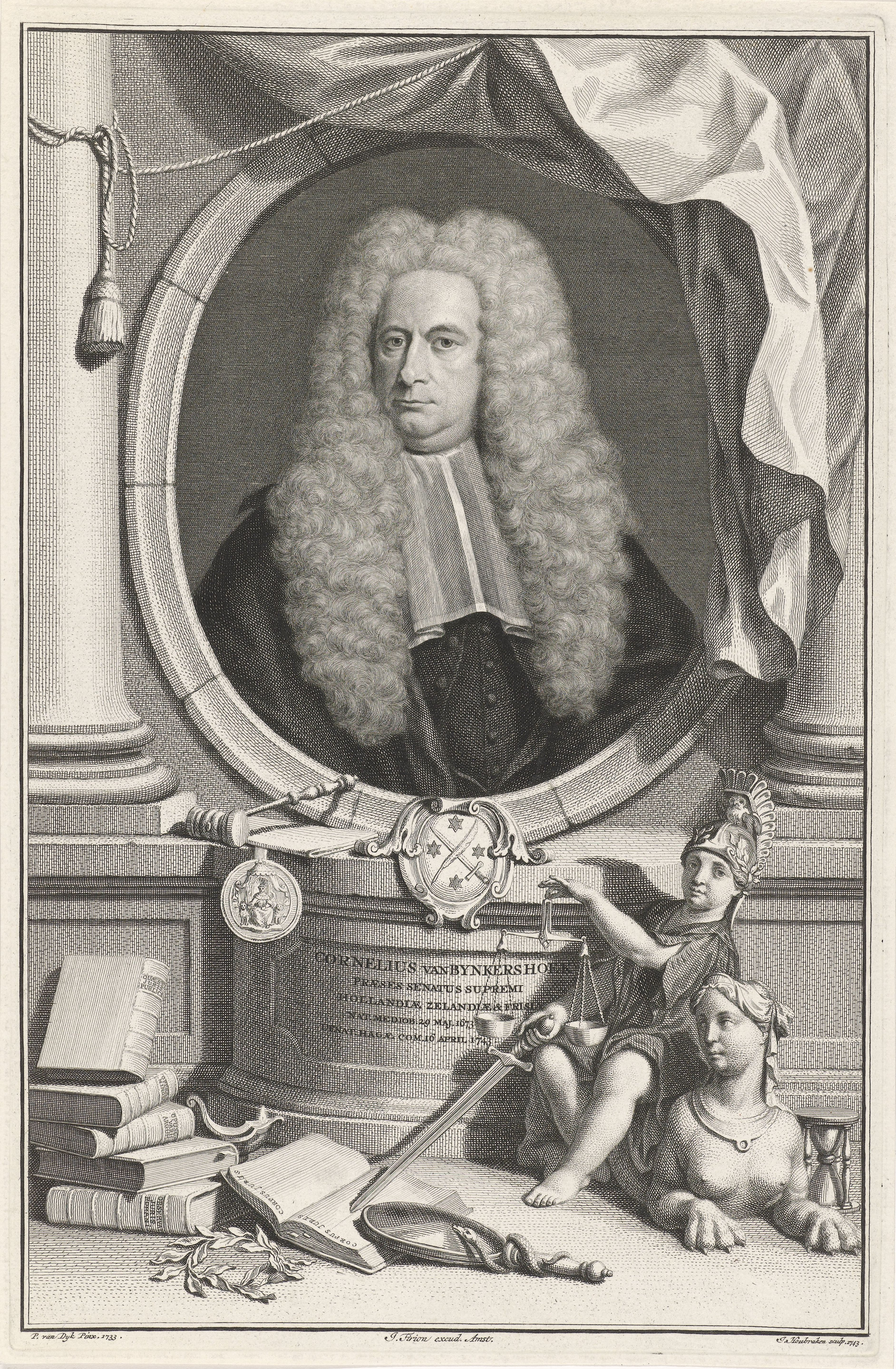 IdentificatieTitel(s): Portret van Cornelis van BynkershoekCornelius van Bynkershoek (titel op object)Objecttype: prent Objectnummer: RP-P-OB-48.882Catalogusreferentie: Ver Huell 69Opmerking: supplement p. 14FMP 867-aOpschriften / Merken: verzamelaarsmerk, verso linksonder, gestempeld: Lugt 240Omschrijving: Buste van Cornelis van Bynkershoek in een ovaal, tussen twee zuilen. Rechts een gordijn en op de voorgrond de personificatie van de rechtspraak, gezeten op de rug van een sfinx. Links op de voorgrond boeken over de rechtspraak, een lauwerkrans en een spiegel met een slang rond het handvat. Onder het portret zijn wapen en zijn naam en gegevens in vier regels in het Latijn.VervaardigingVervaardiger: prentmaker: Jacob Houbraken (vermeld op object)naar schilderij van: Philip van Dijk (vermeld op object)uitgever: Isaak Tirion (vermeld op object)Plaats vervaardiging: AmsterdamDatering: 1743Fysieke kenmerken: gravure en etsMateriaal: papier Techniek: graveren (drukprocedé) / etsenAfmetingen: plaatrand: h 364 mm × b 237 mmOnderwerpWat: sphinx (lion/woman); 'Sfinge' (Ripa)symbols and allegories of jurisprudenceWie: Cornelis van BynkershoekVerwerving en rechtenVerwerving: overdracht van beheer 1816Copyright: Publiek domein